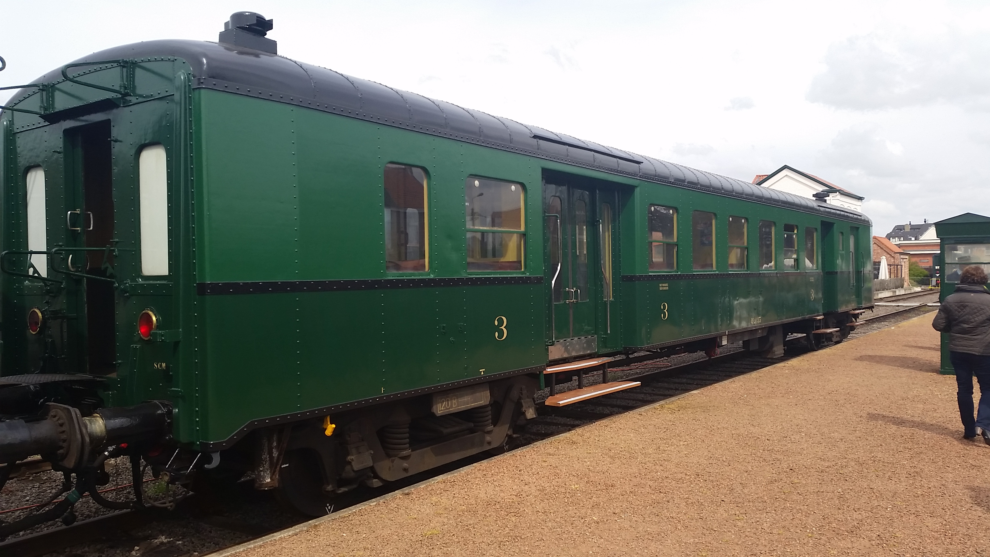 Foto gemaakt tijdens een Open Dag van het Stoomcentrum Maldegem in 2016.